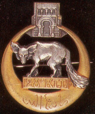 insigne régimentaire du 28e régiment de tirailleurs Tunisiens. ما شاء الله (God willings)